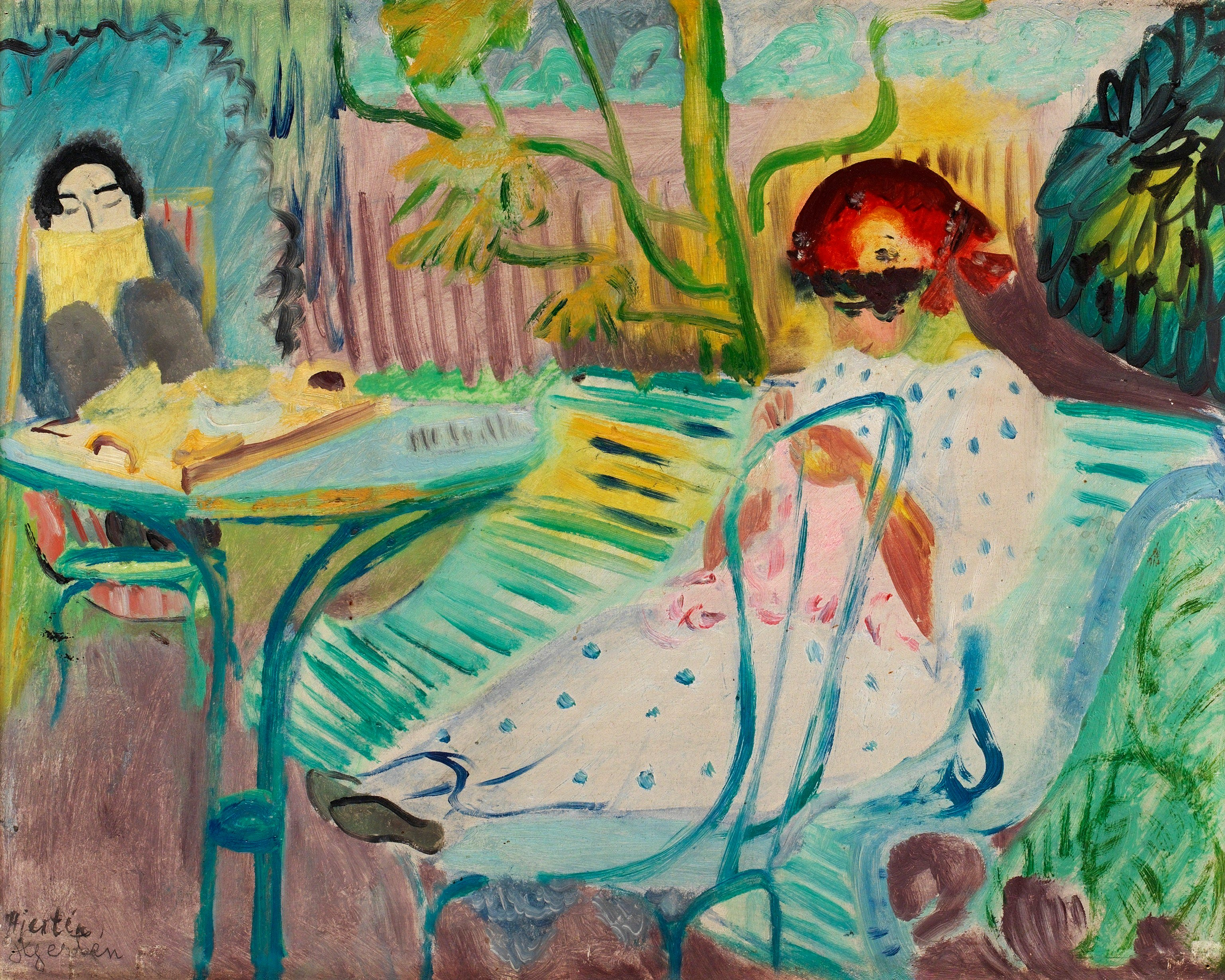 Sigrid Hjertén, Jardin nr II (I trädgården, Fontenay-aux-Roses). Signerad Hjertén. Utförd 1920. Pannå 32,5 x 41 cm.